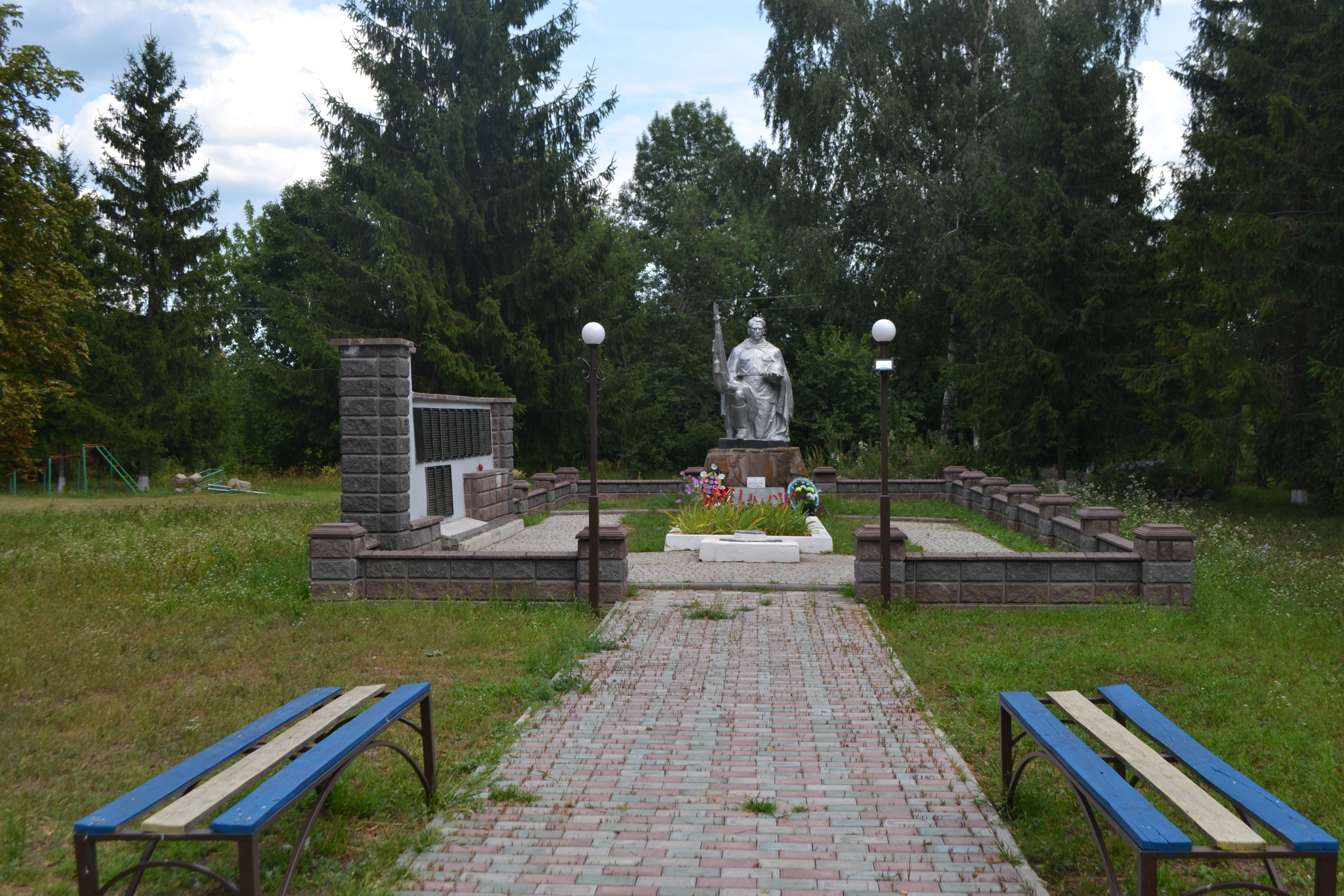 Братська могила радянських воїнів та пам’ятник воїнам-землякам, Волошнівка, центр села